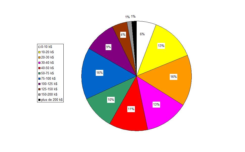 Distribution du revenu annuel des foyers dans la population de Delphos (Ohio - Etats-Unis) en 2007